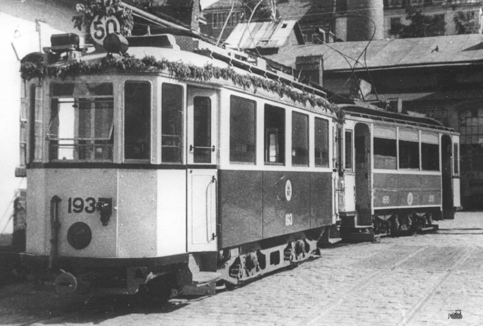 50-річчя львівського трамваю.Зчеплені вагни Lilpop і Sanok, прикрашені до 50-річчя львівського трамваю. Ці вагони не є зчеплені! Зверніть увагу на контактні дуги! Вони направлені в різних напрямах! Окрім того обидва вагони (і Liptop 193 i Sanok 156) моторні.